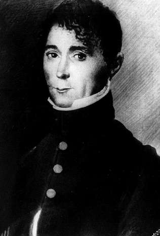 Gravado de época de Bernardo González del Valle, Cachamuíña (1771-1848)